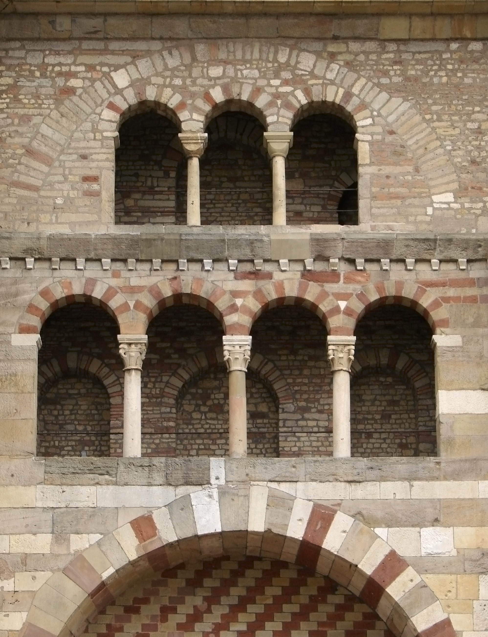 Détail de la façade de la cathédrale Saint-Pierre à Trèves.